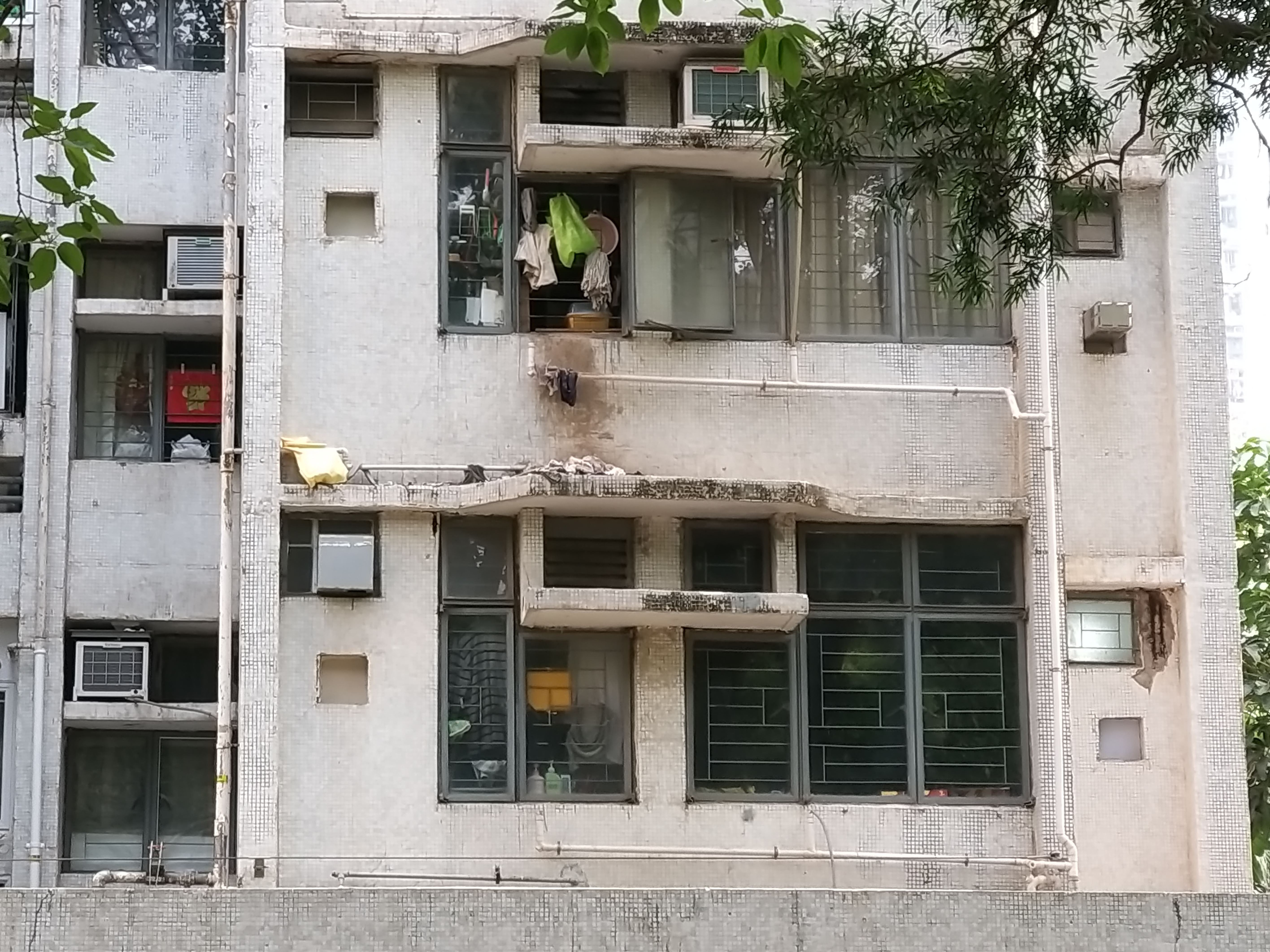 可見單位從中央一分為二，各有獨立廚廁